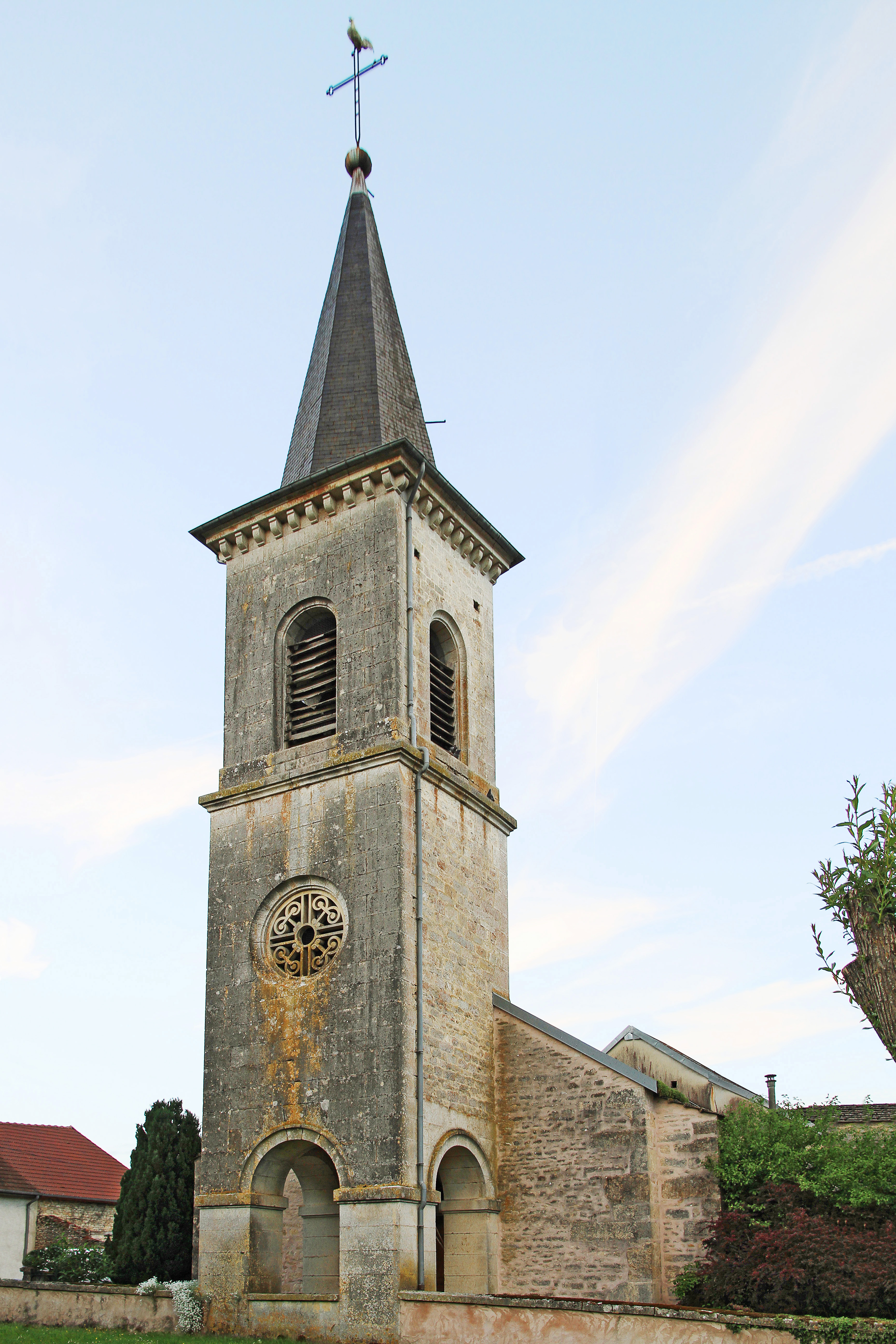 Église Sainte-Catherine de Poiseul-la-Grange